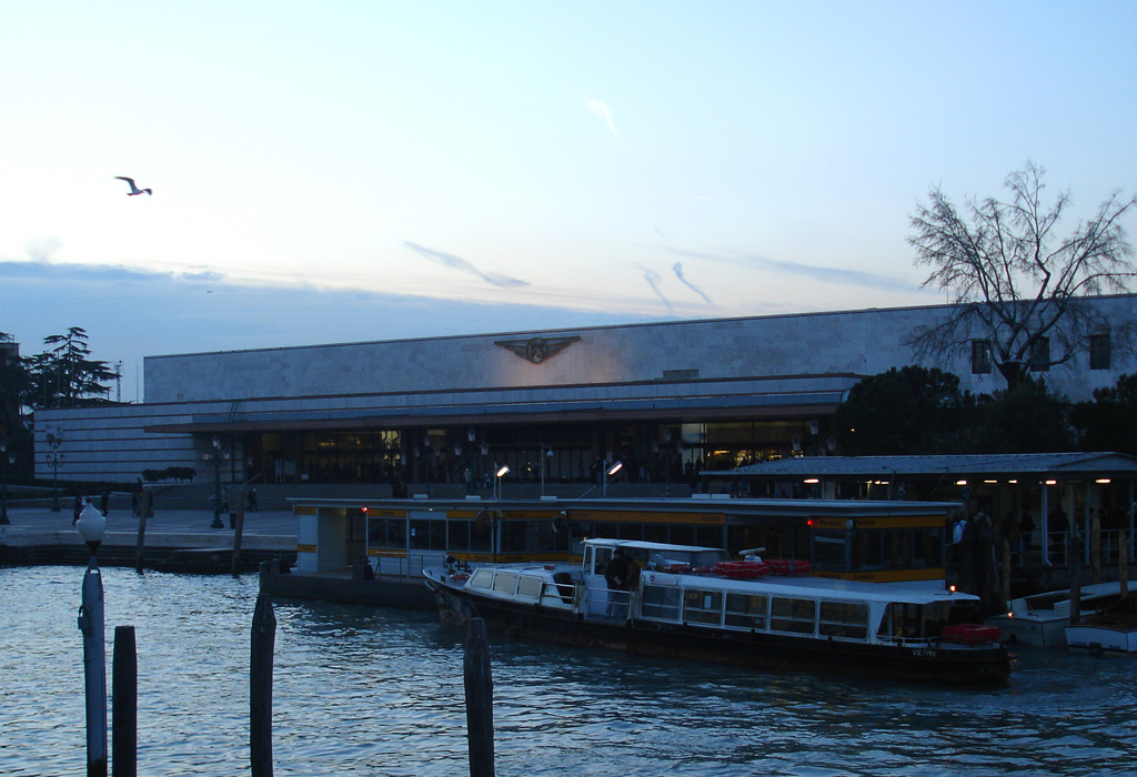 Entrata della Stazione di Santa Lucia